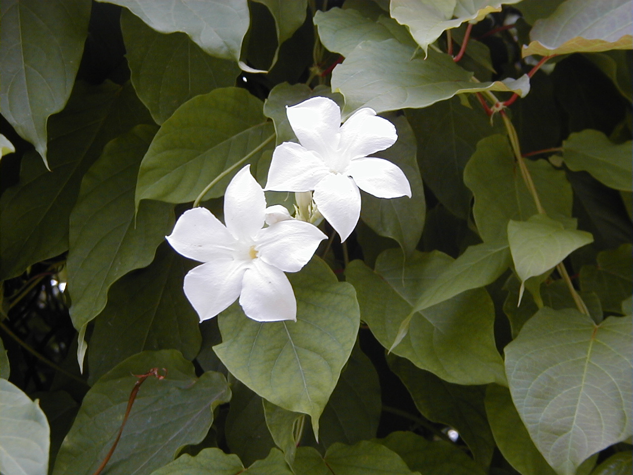 Mandevilla suaveolens. Real Jardín Botánico de Madrid.